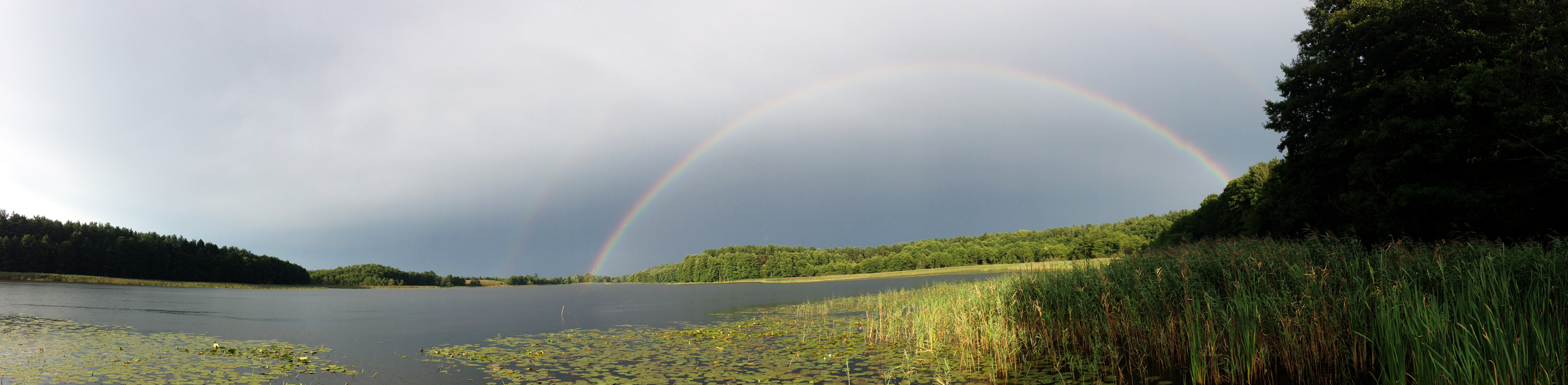 Panorama jeziora Rekąty. Widok od strony wsi Liski.